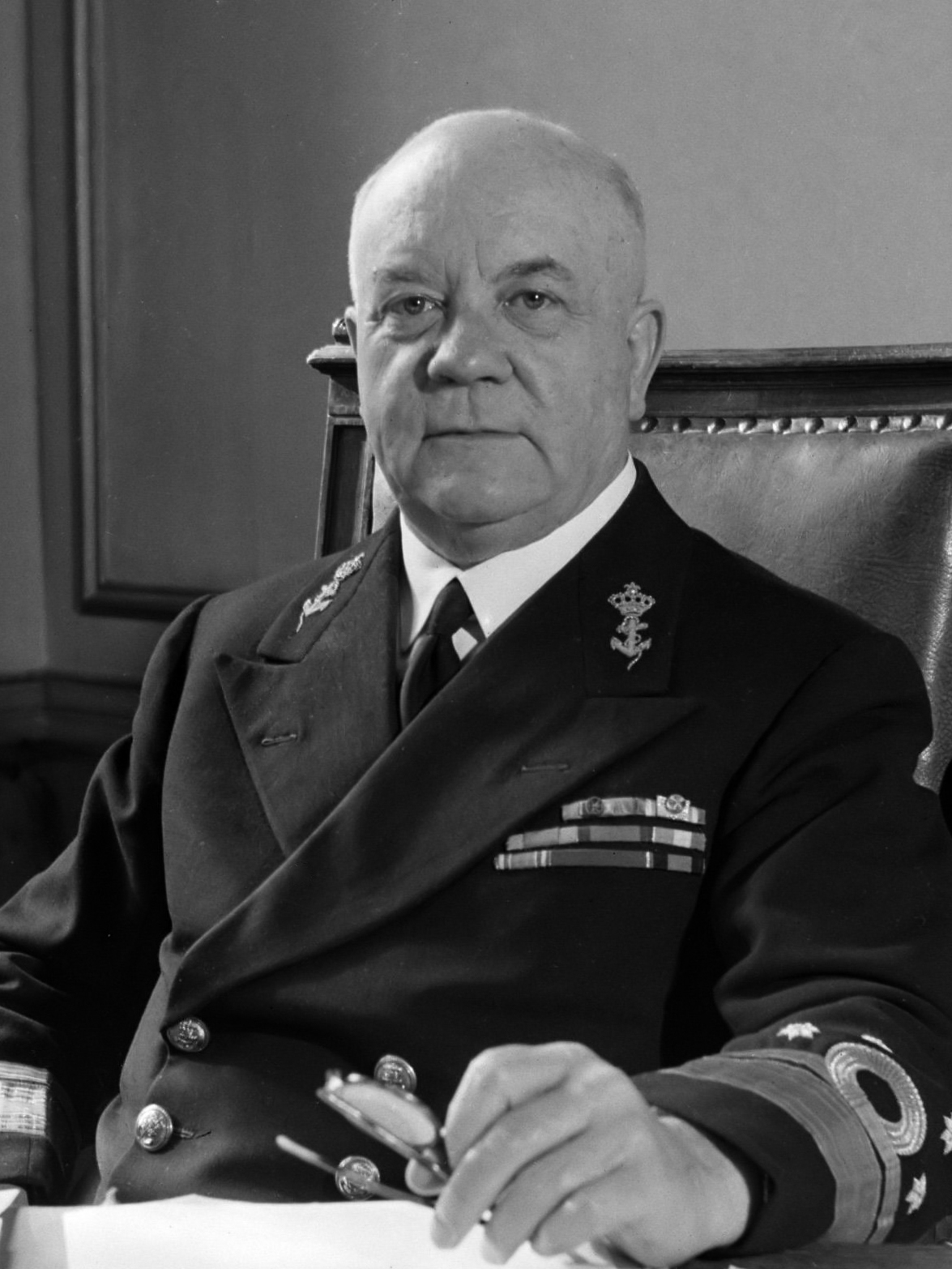 Portret van luitenant-admiraal Helfrich ter gelegenheid van zijn 60ste verjaardag in 1946 11 oktober 1946